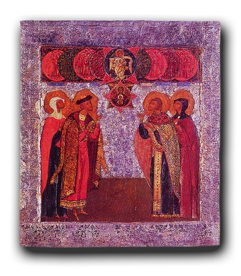 Св. равноап. Мария Магдалина, св. кн. Борис, сщмч. Феодот Киринейский, прп. Ксения. Патрональная икона семьи царя Бориса Феодоровича Годунова. 1589 г. (ПИАМ) Вкладная икона семьи Бориса Годунова в Новгородскую Софию. Конец XVI века